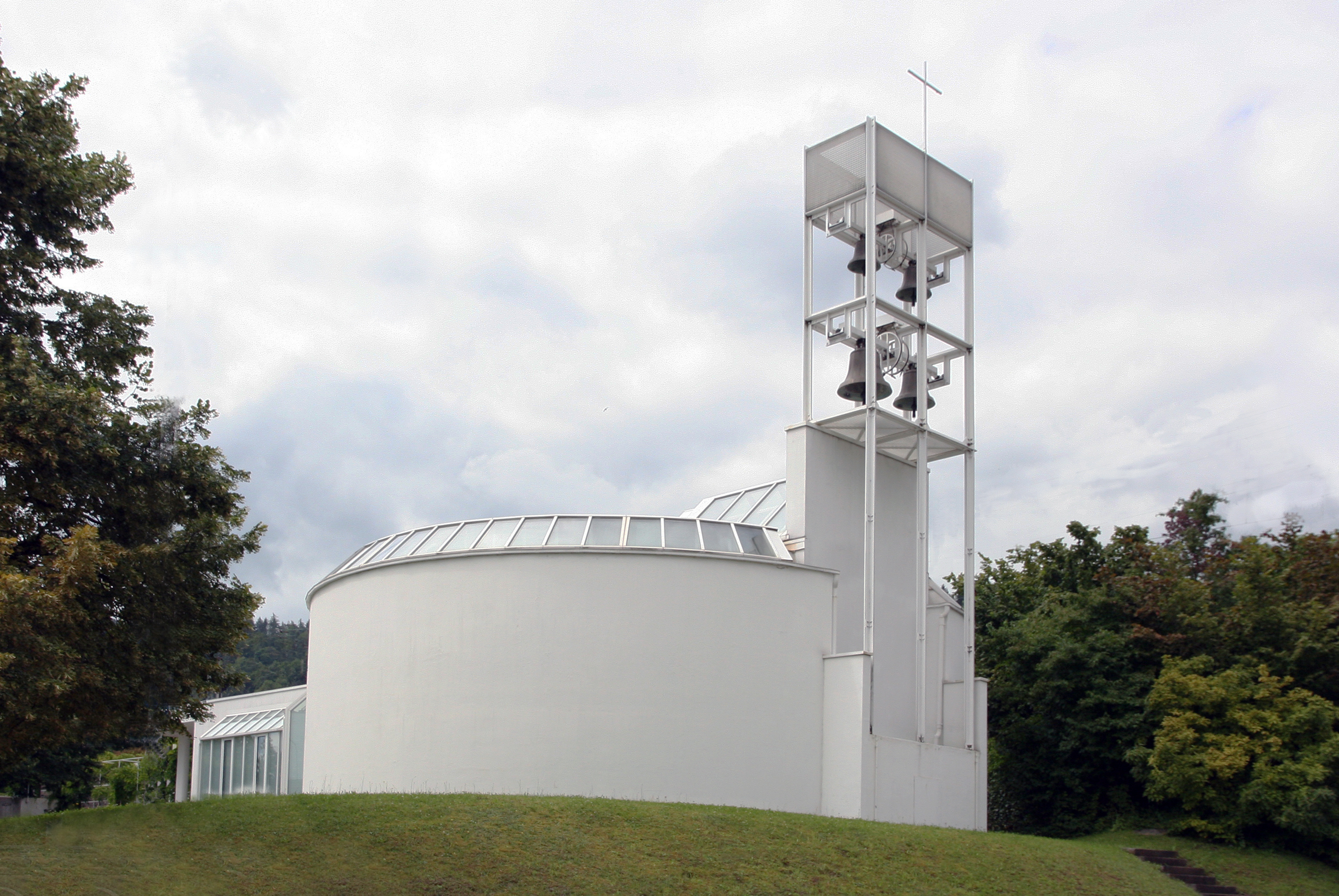 Römisch-katholische Kirche Heilig Chrüz Oberrieden ZH, Ansicht von Nordosten